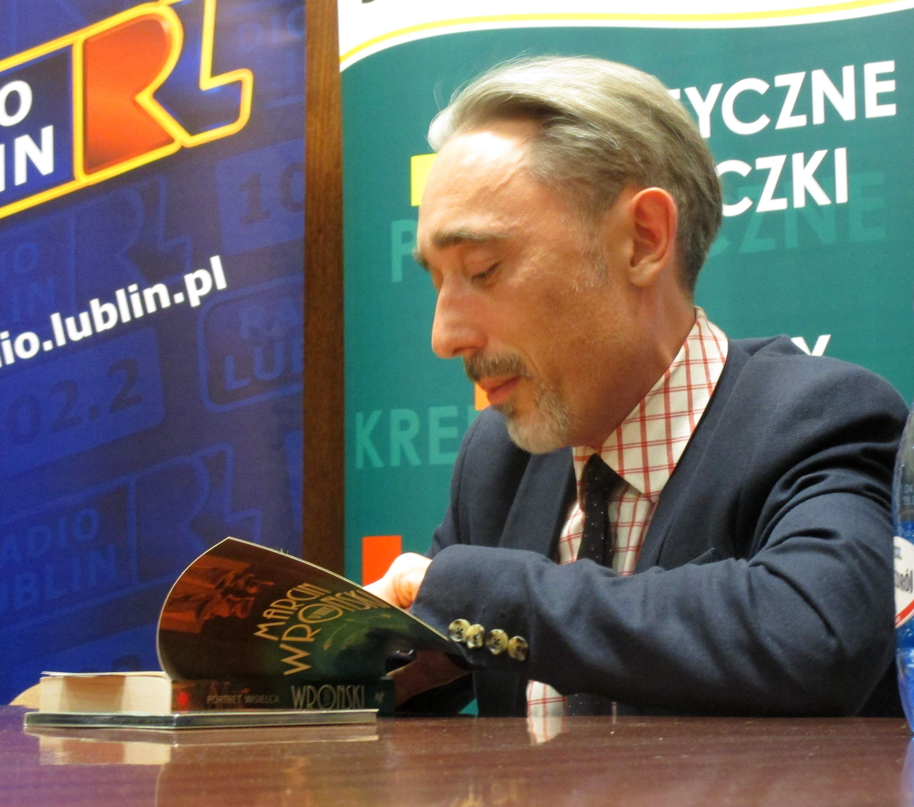 Marcin Wroński podpisuje książkę "Portret wisielca" podczas spotkania z czytelnikami w Radiu Lublin